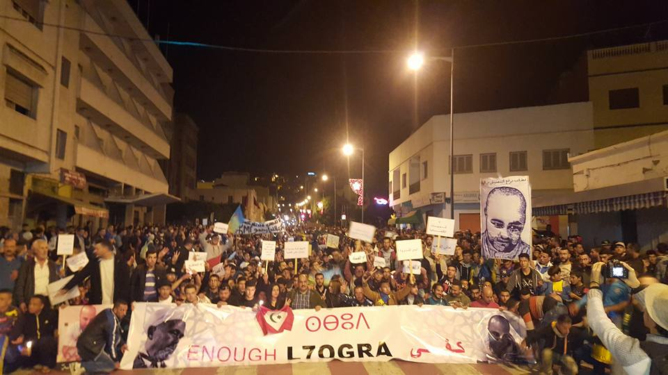 Maġribi: مظاهرة د الحراك فالليل فالحسيمة